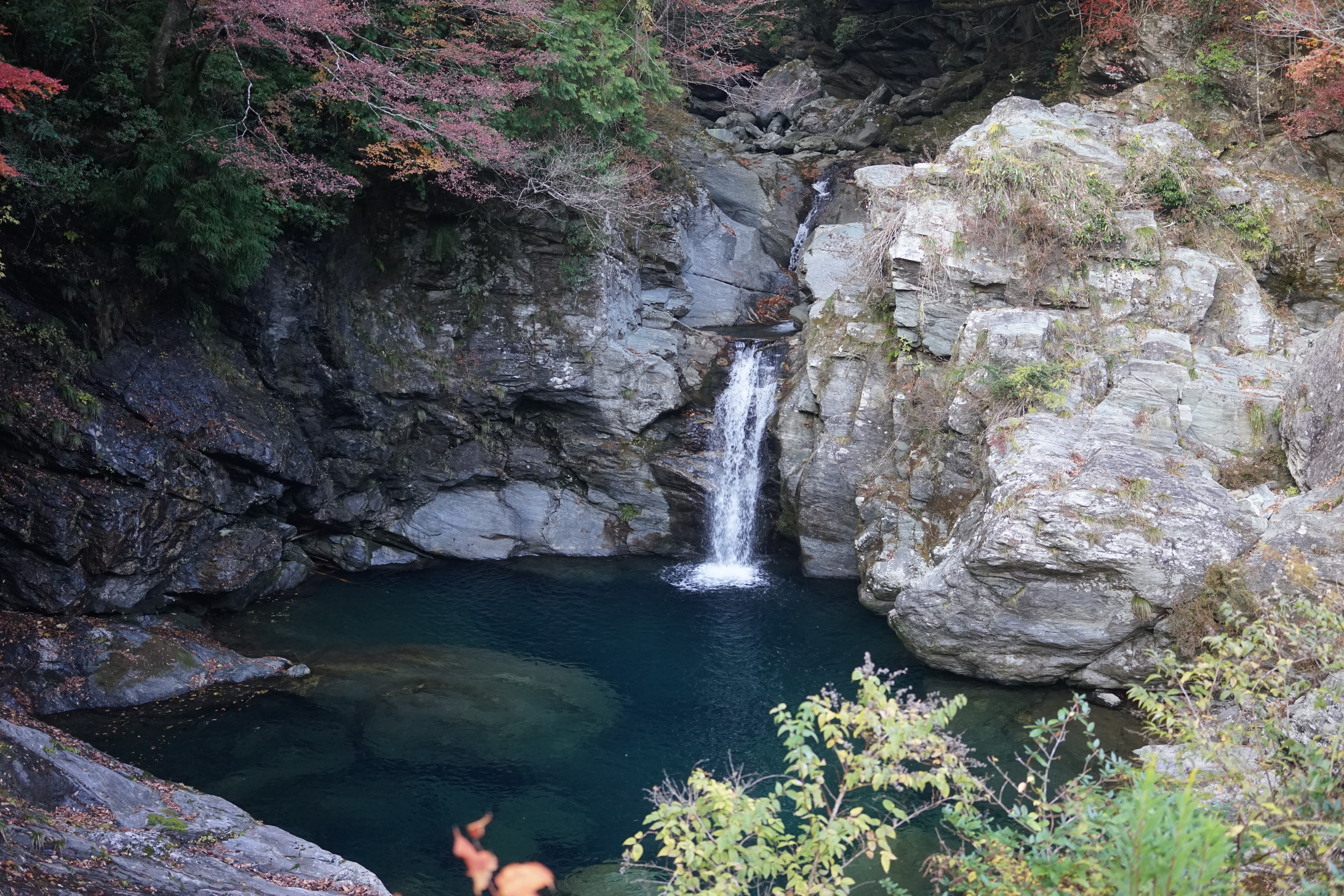 大川村小北川の滝